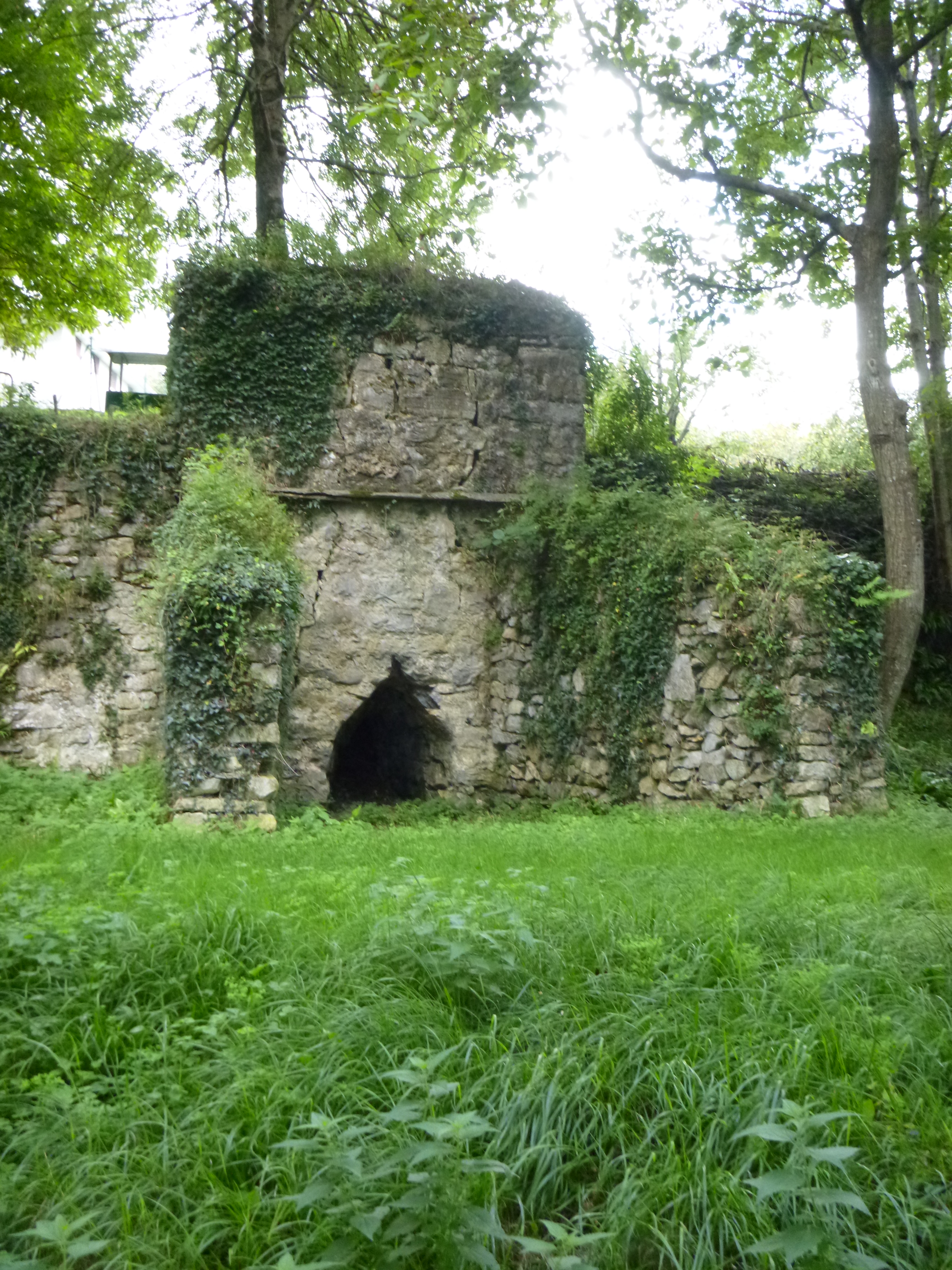 Karobia Santiagomendin